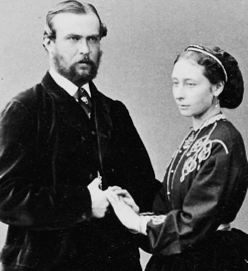 ロシア帝国最後の皇后アレクサンドラの両親